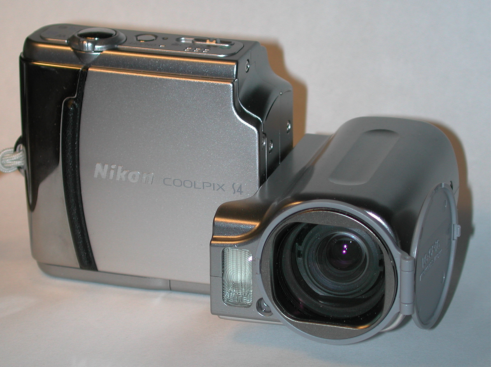 Nikon Coolpix model S4